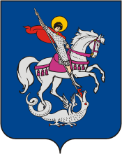 Герб Георгиевского района